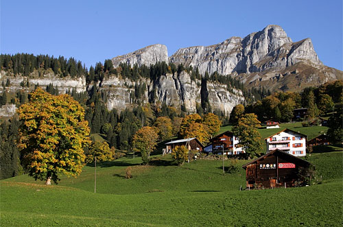 Braunwald: Hüttenberg und Eggstöcke